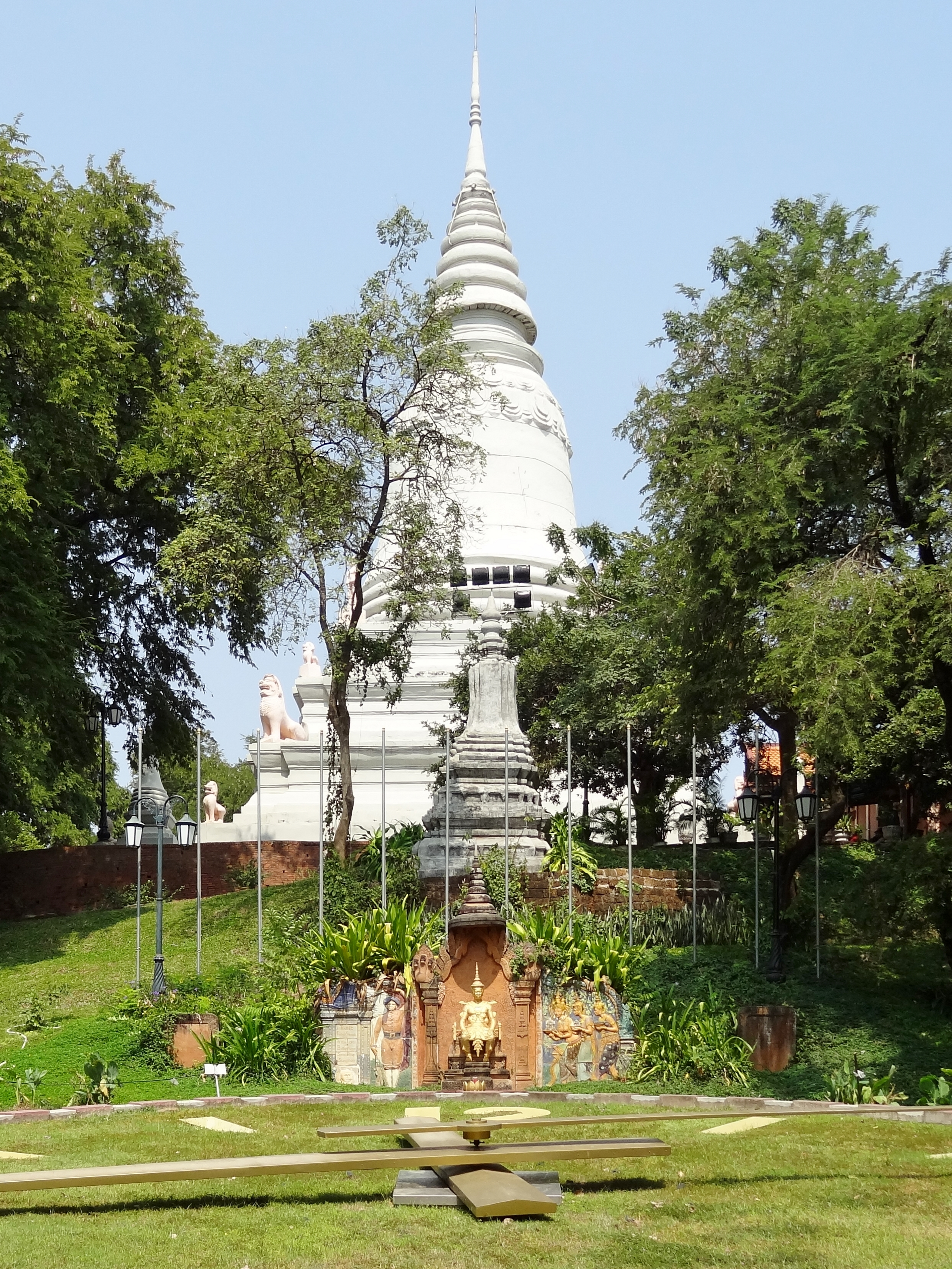 Wat Phnom Daun Penh in Phnom Penh, Kambodscha